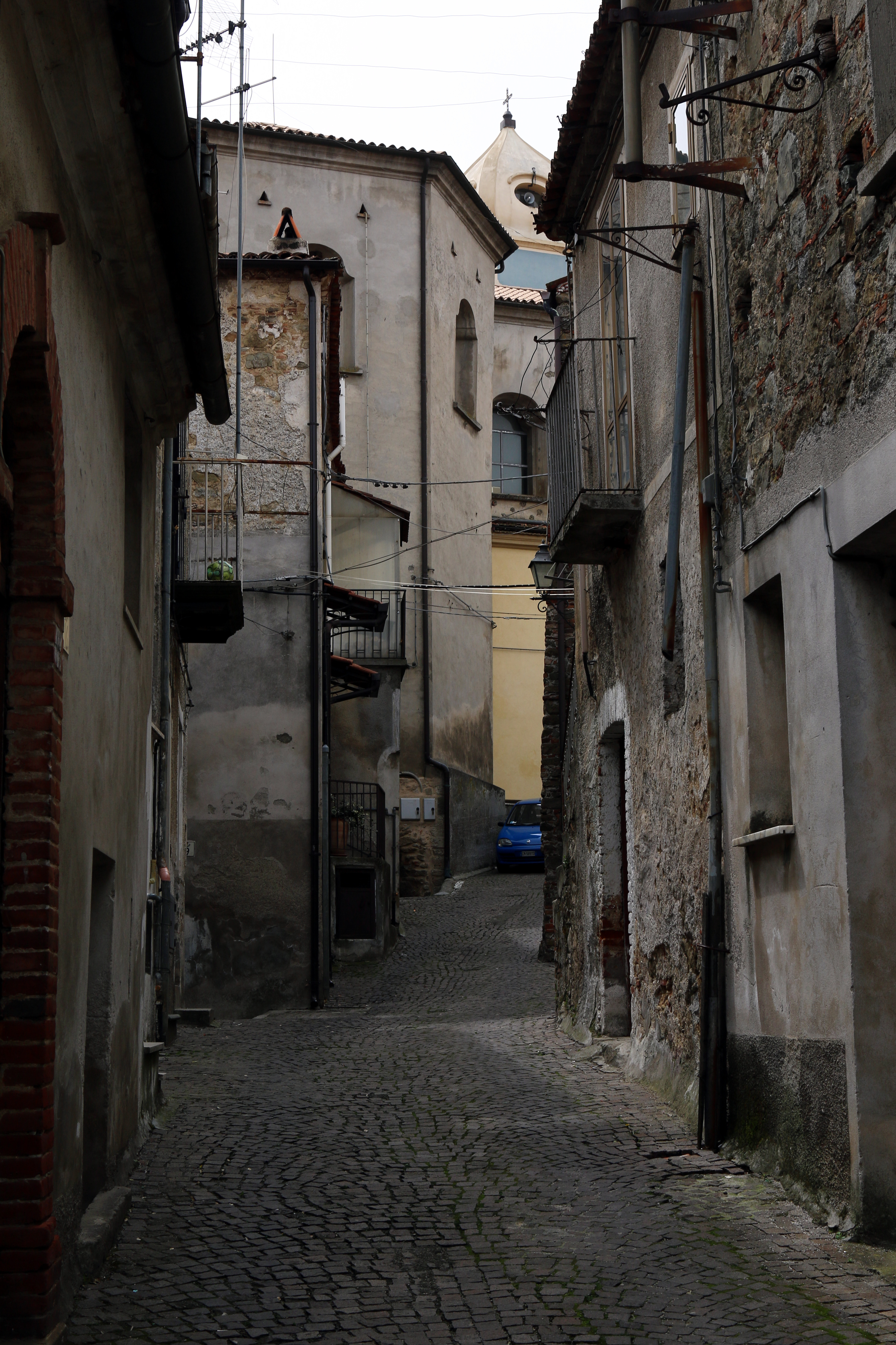 Via G.B. Romano, che conduce da Piazza Plebiscito alla Chiesa Madre